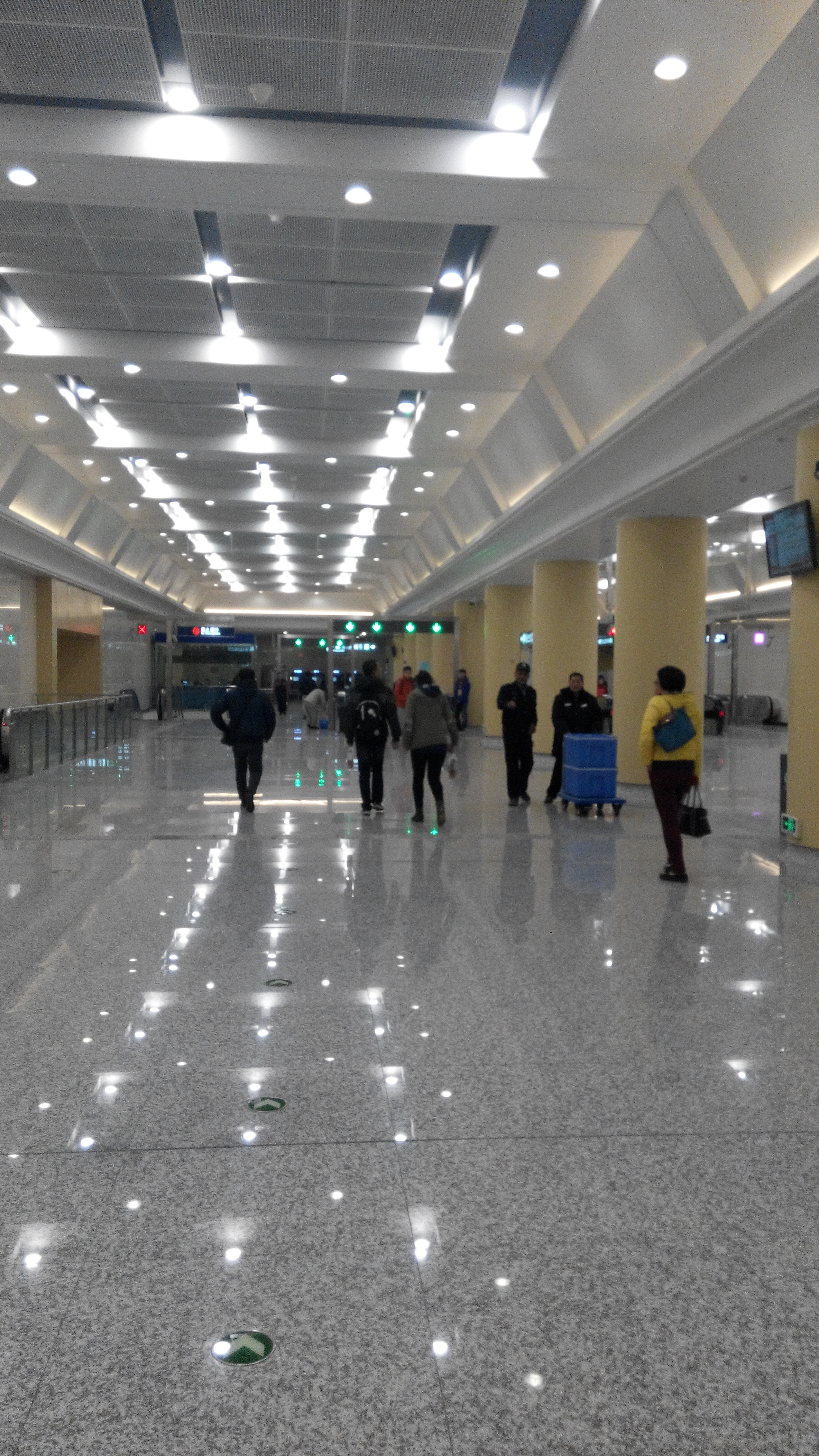 中文（中国大陆）: 清华东路西口站厅